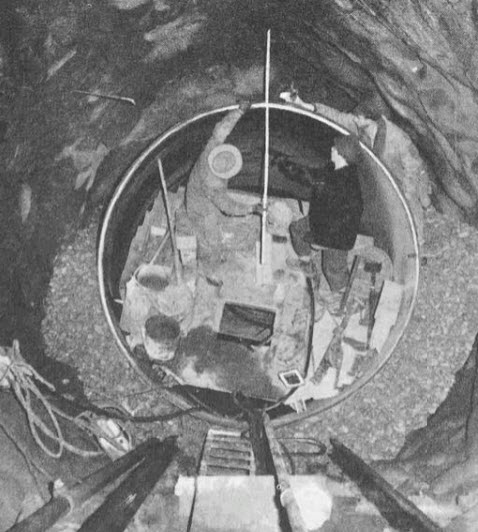 Hinterbetonierung der Panzerung des Schrägschachtes für die Zuführung von Wasser zu Limberg I im Prepakt-Verfahren.